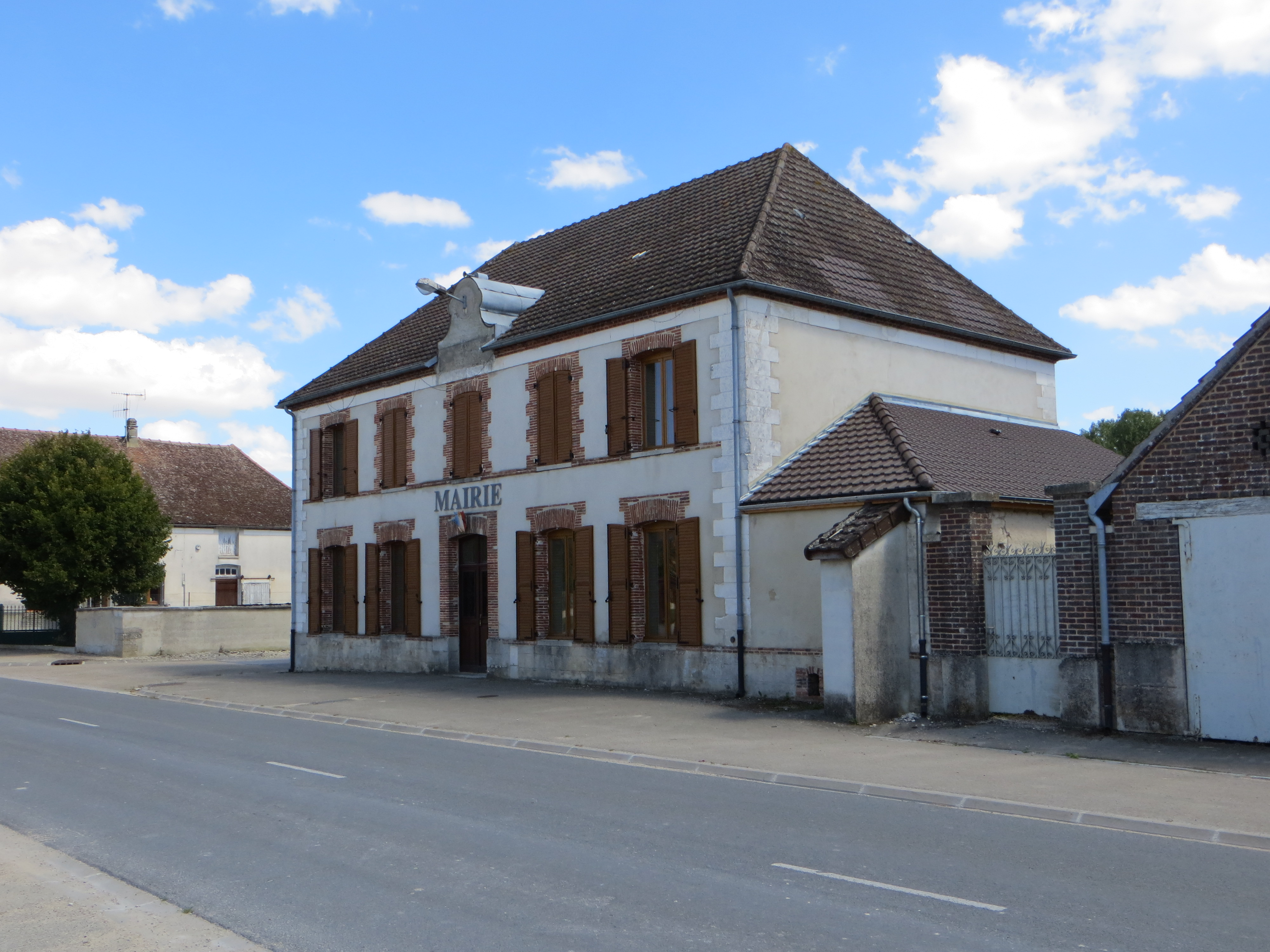 Mairie du village